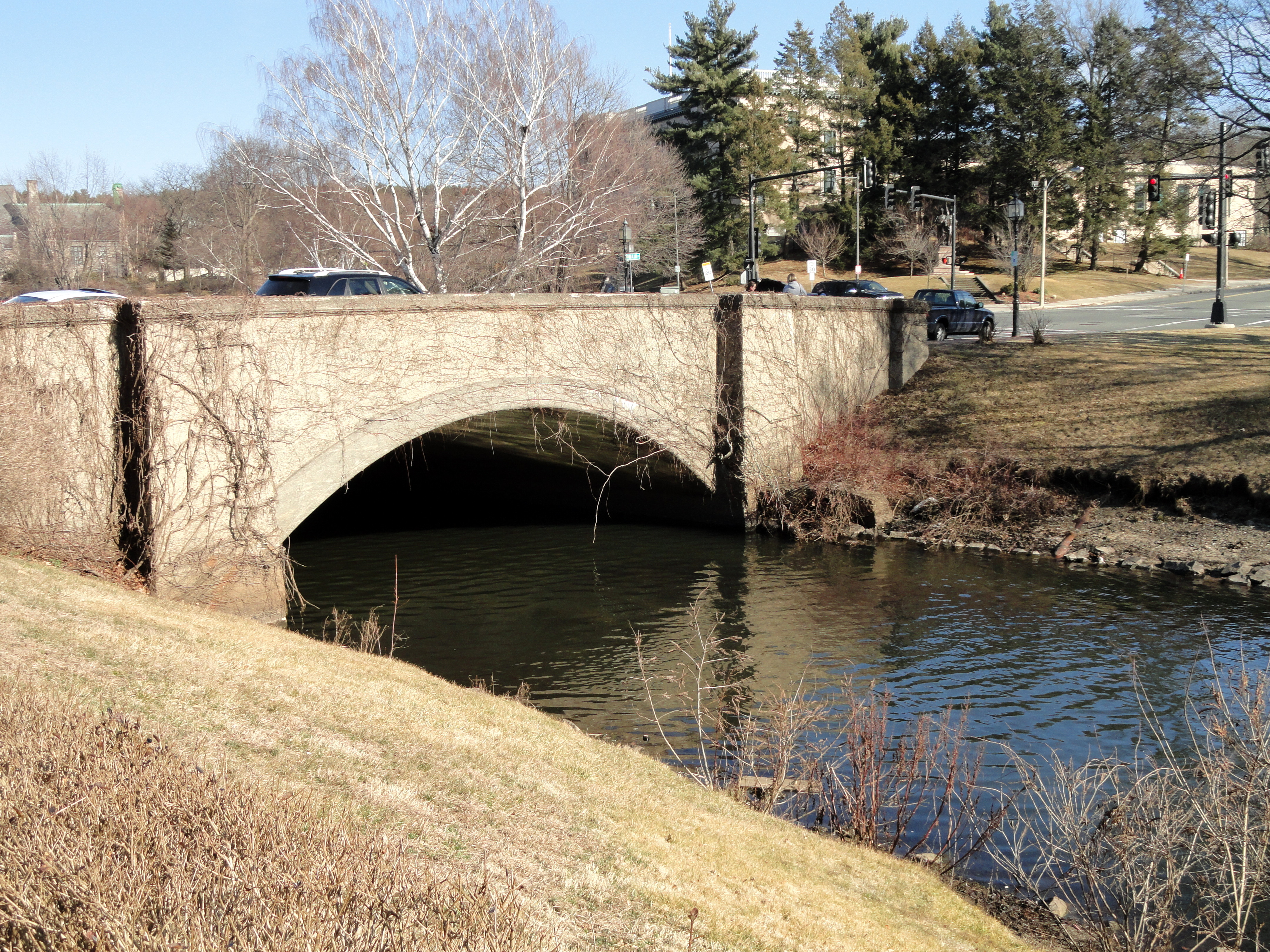 Aberjona River, Winchester, Massachusetts, USA.